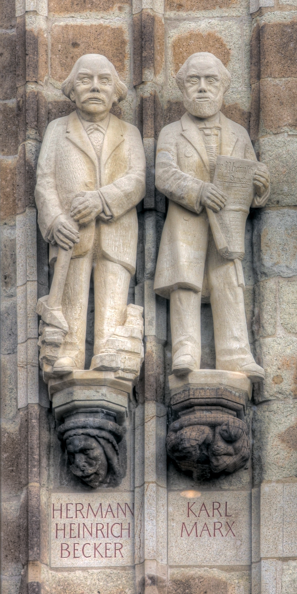 Rathausturm Köln mit den Figuren des Hermann Heinrich Becker und Karl Marx Details zu den Konsolen: Thema der Konsole unter der Becker-Statue: „Karnevalsjeck“. Bildhauer: unbekannt, Original aus dem 19. Jahrhundert Thema der Konsole unter der Marx-Statue: „Autounfall“. Bildhauer: Gerd Haas